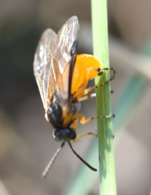 Athalia cf. cordata am 24.9.2016 in der Schwetzinger Hardt